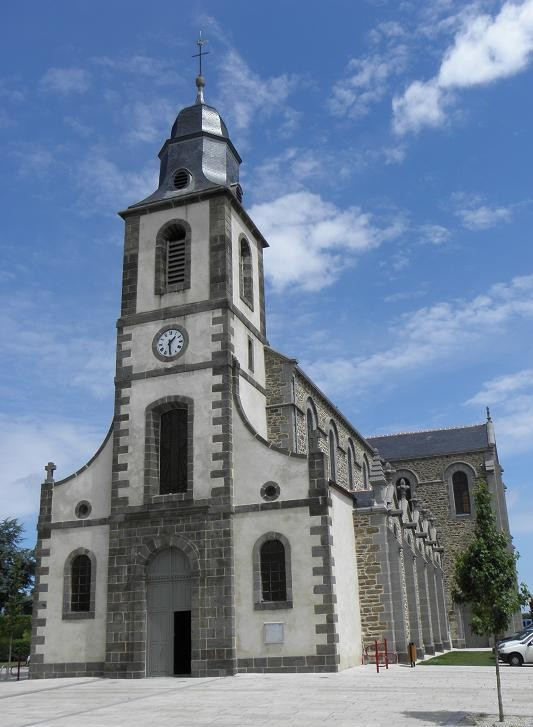 Façade principale de l'église Saint-Jean-Baptiste de Saint-Jouan-des-Guérets (35).